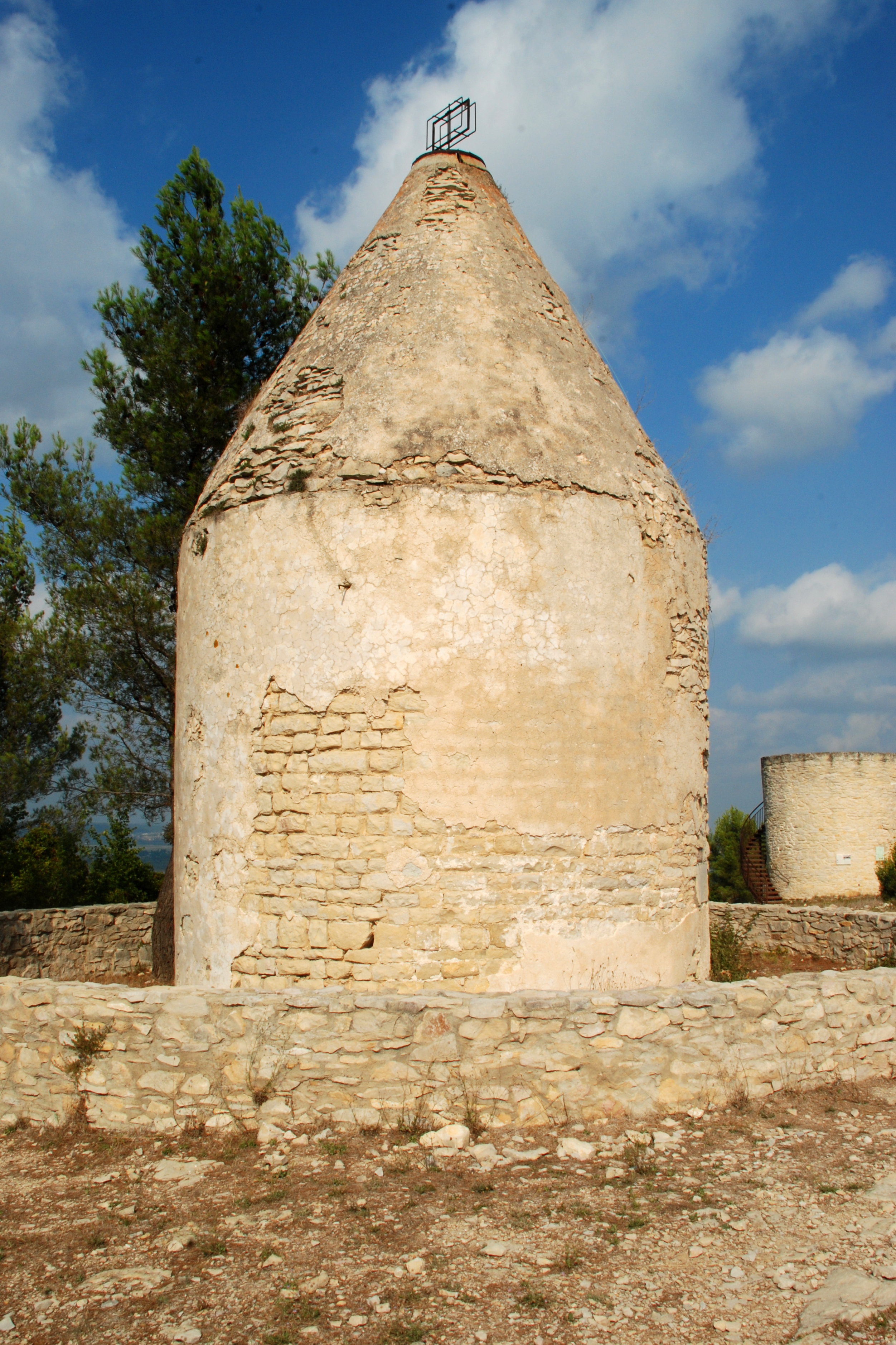 France - Gard - Calvisson - Roc de Gachone